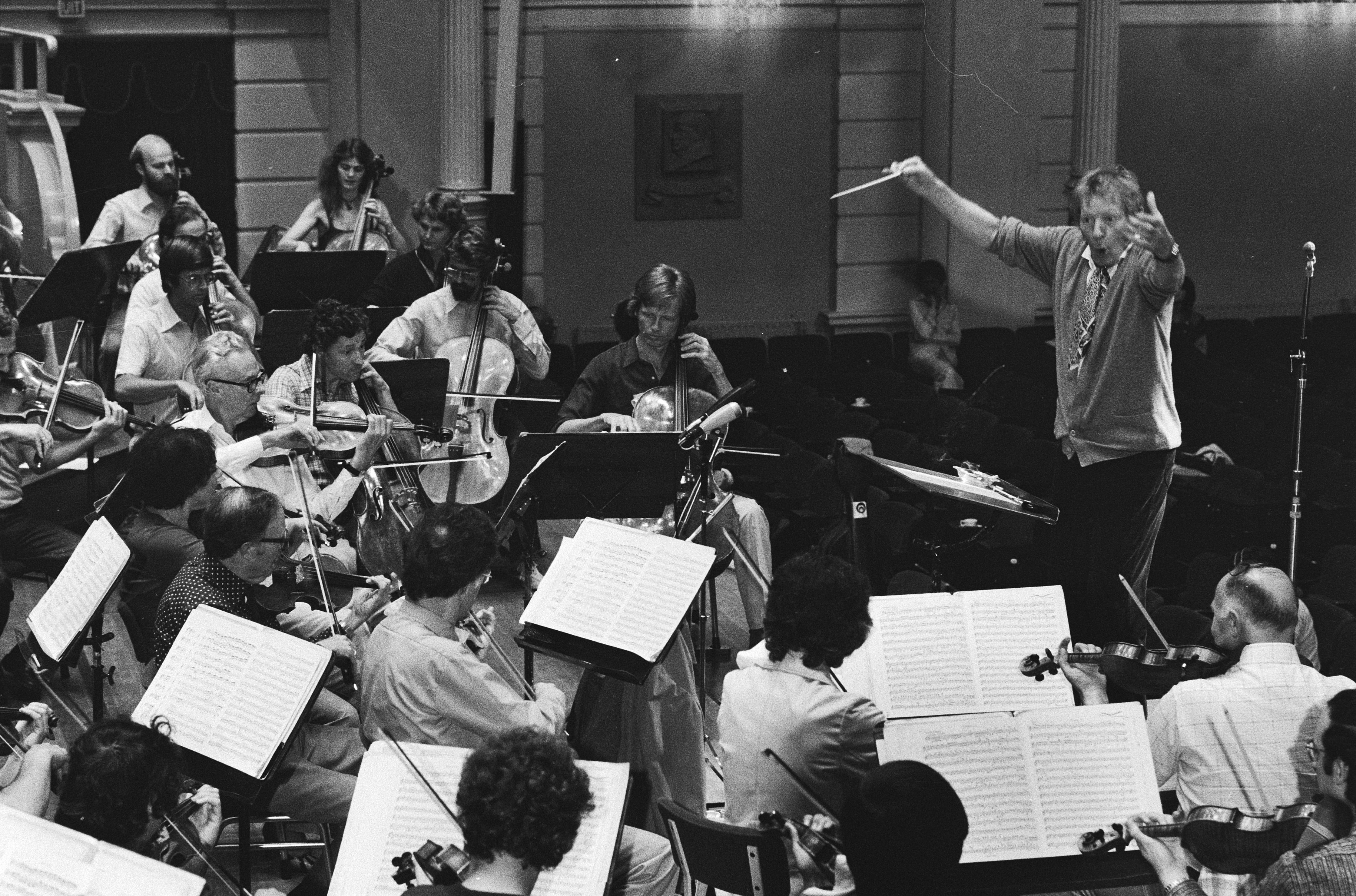 Collectie / Archief : Fotocollectie Anefo Reportage / Serie : Danny Kaye dirigeert het Concertgebouworkest in het kader van "Het jaar van het kind" van de Unesco Beschrijving : Tijdens de repetities met orkest Datum : 22 juni 1979 Locatie : Amsterdam, Noord-Holland Trefwoorden : acteurs, dirigenten, komieken, orkesten, repetities Persoonsnaam : KAYE DANNY Fotograaf : Croes, Rob C. / Anefo Auteursrechthebbende : Nationaal Archief Materiaalsoort : Negatief (zwart/wit) Nummer archiefinventaris : bekijk toegang 2.24.01.05 Bestanddeelnummer : 930-3271